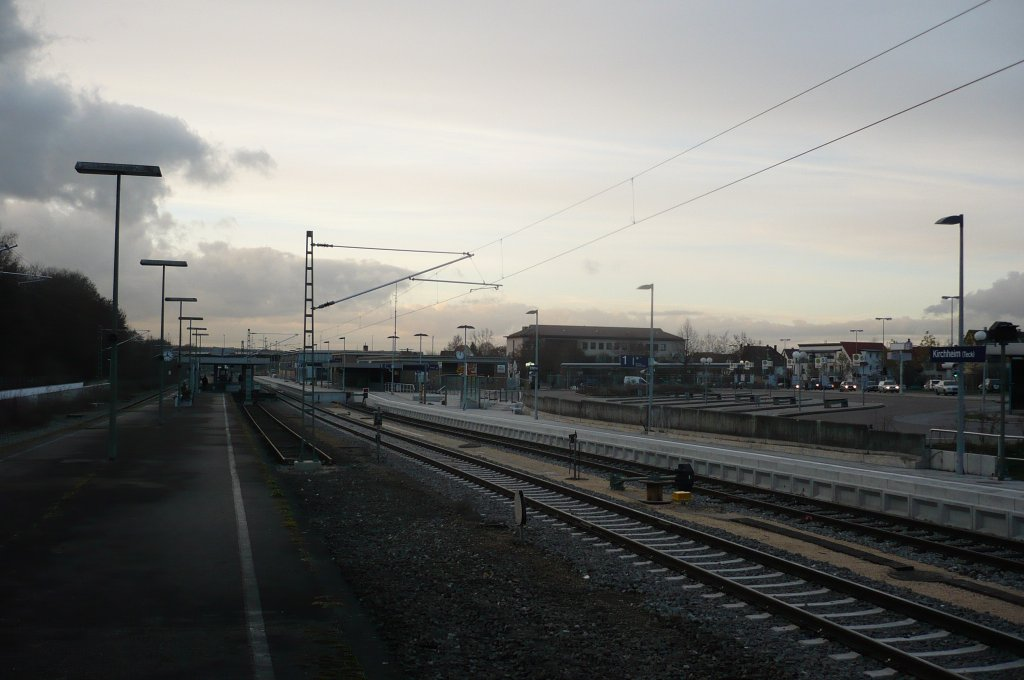 Der Bahnhof Kirchheim (Teck) am 09.12.2009 vor der Inbetriebnahme des elektrischen Zugverkehrs der S-Bahnlinie S1.